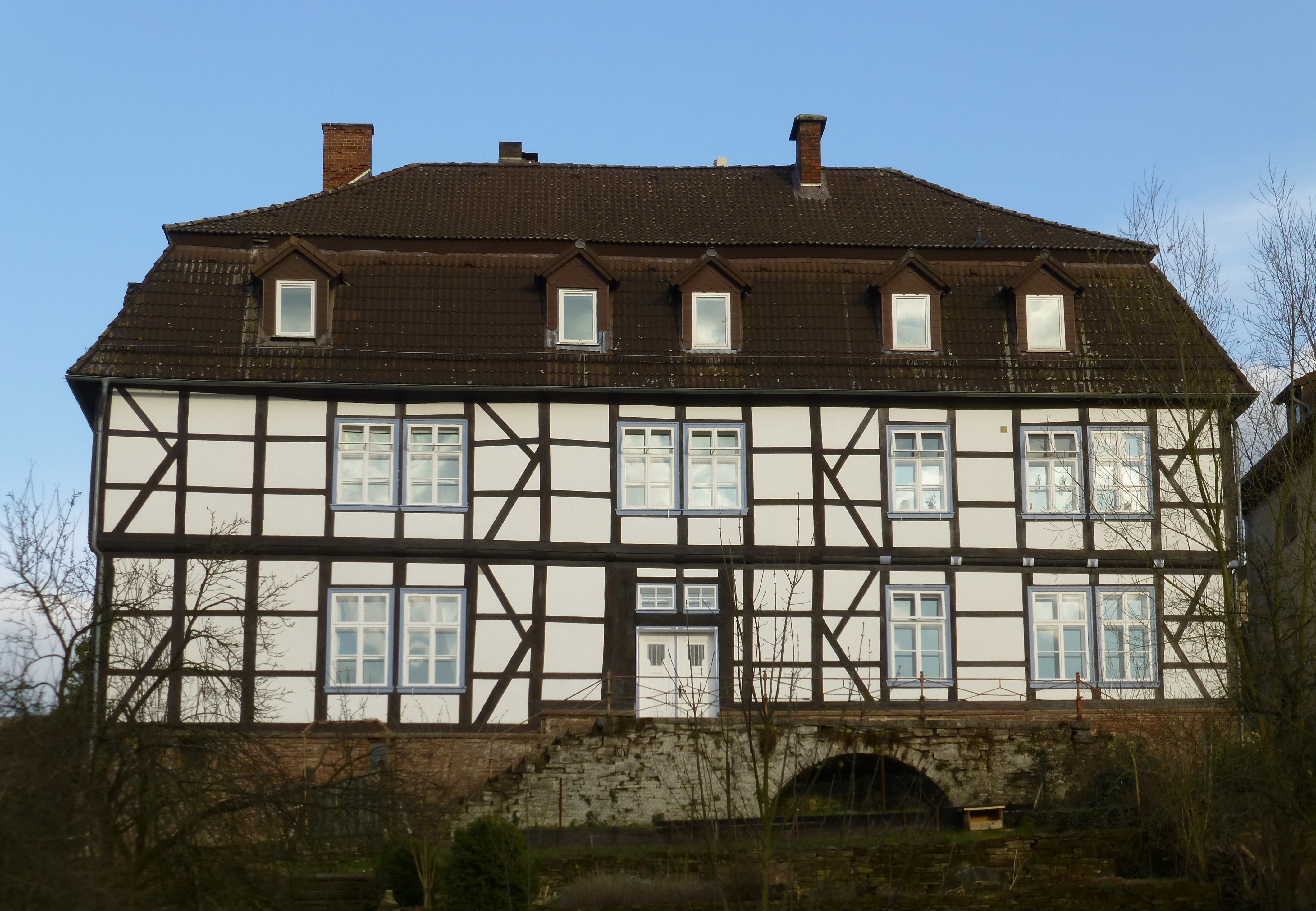 ehemaliges Forsthaus in Schorborn, Gemeinde Deensen, am Nordrand des Solling. Baujahr 1743